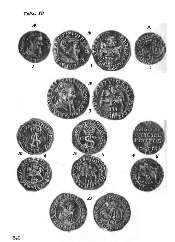 Старая польская монета XVII века